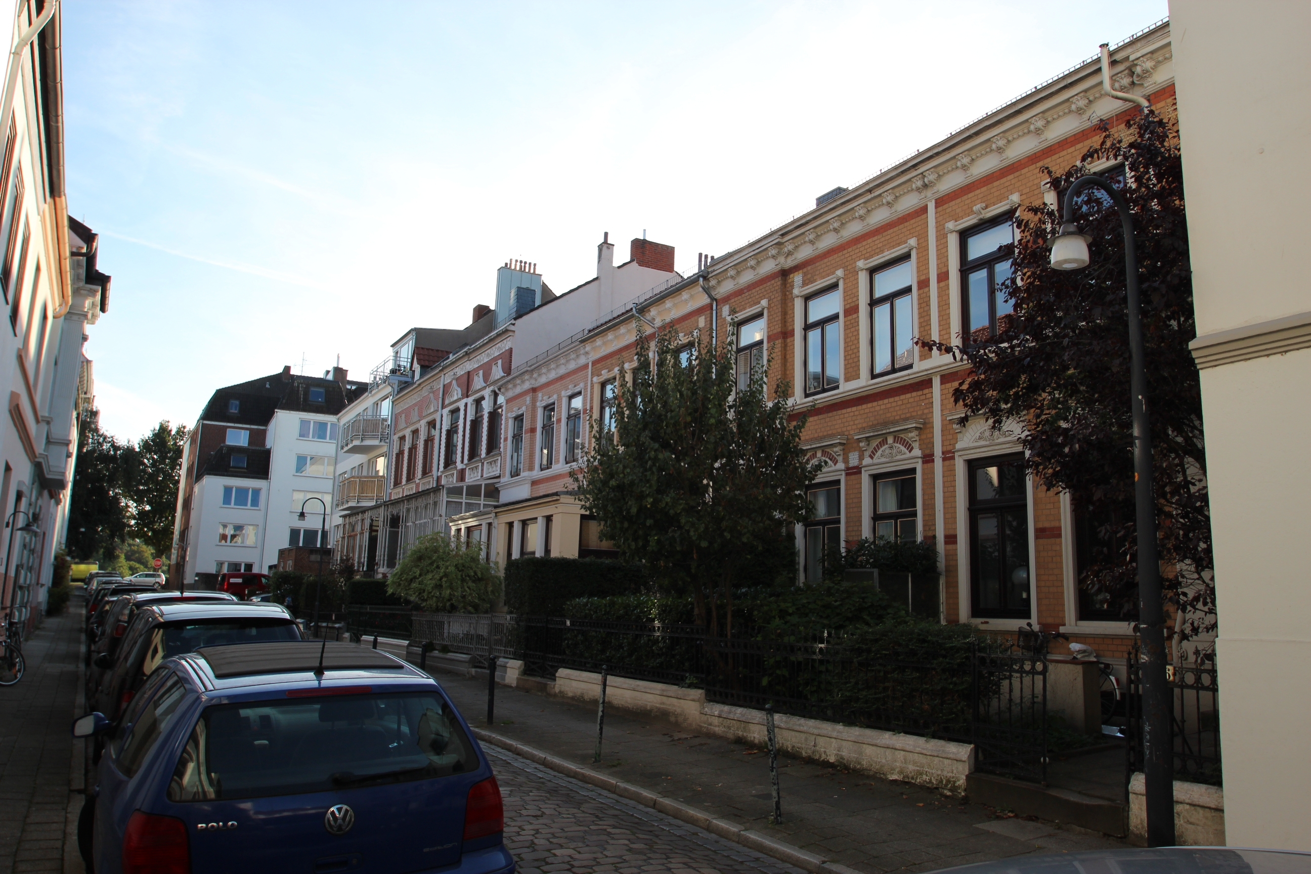 Ensemble Oberweserstraße in BremenDie Denkmalgruppe ist ein geschütztes Kulturdenkmal in der Freien Hansestadt Bremen, mit der Nr. 1435 beim Landesamt für Denkmalpflege registriert.